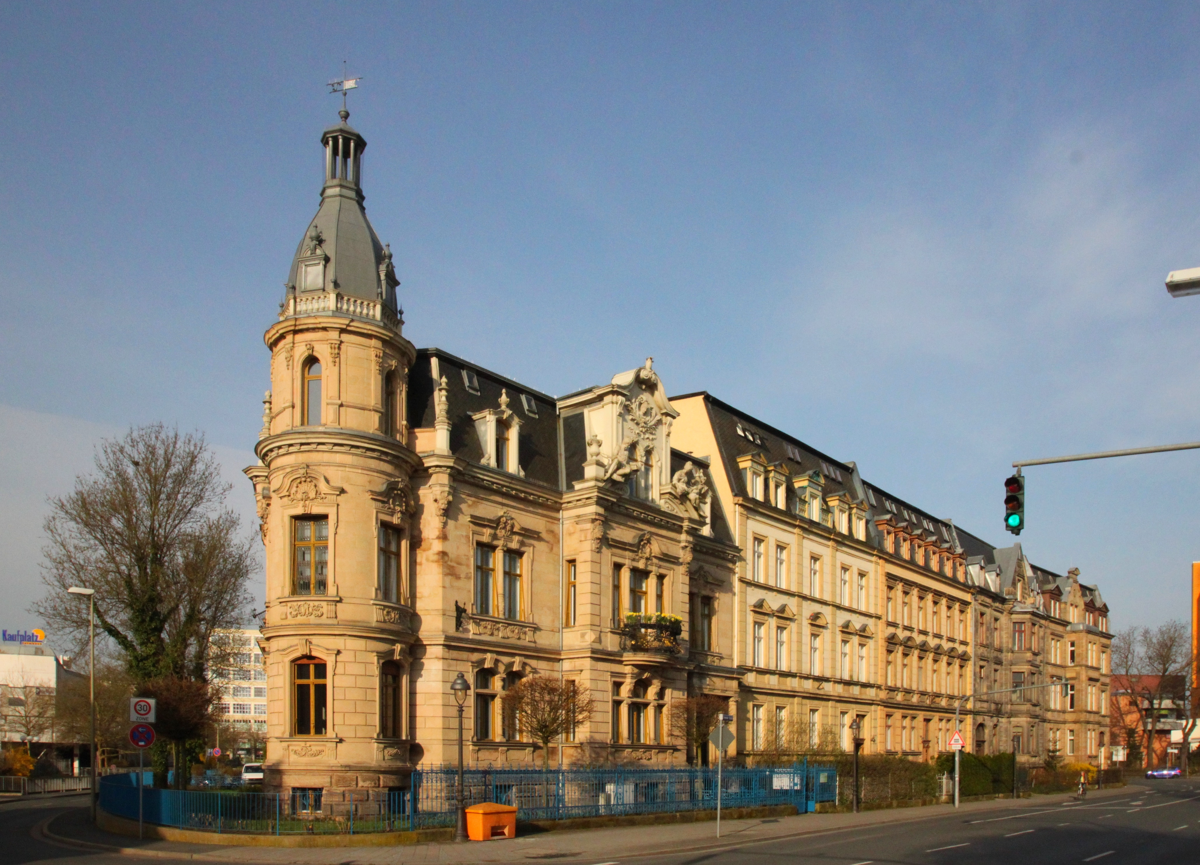 Ensemble Kronacher Straße in Kulmbach, links Eckhaus Kronacher Straße 1, Baudenkmal D-4-77-128-62, und nach Häusern 3 und 5 Kronacher Straße 7, urbanes Wohnhaus Baudenkmal D-4-77-128-297